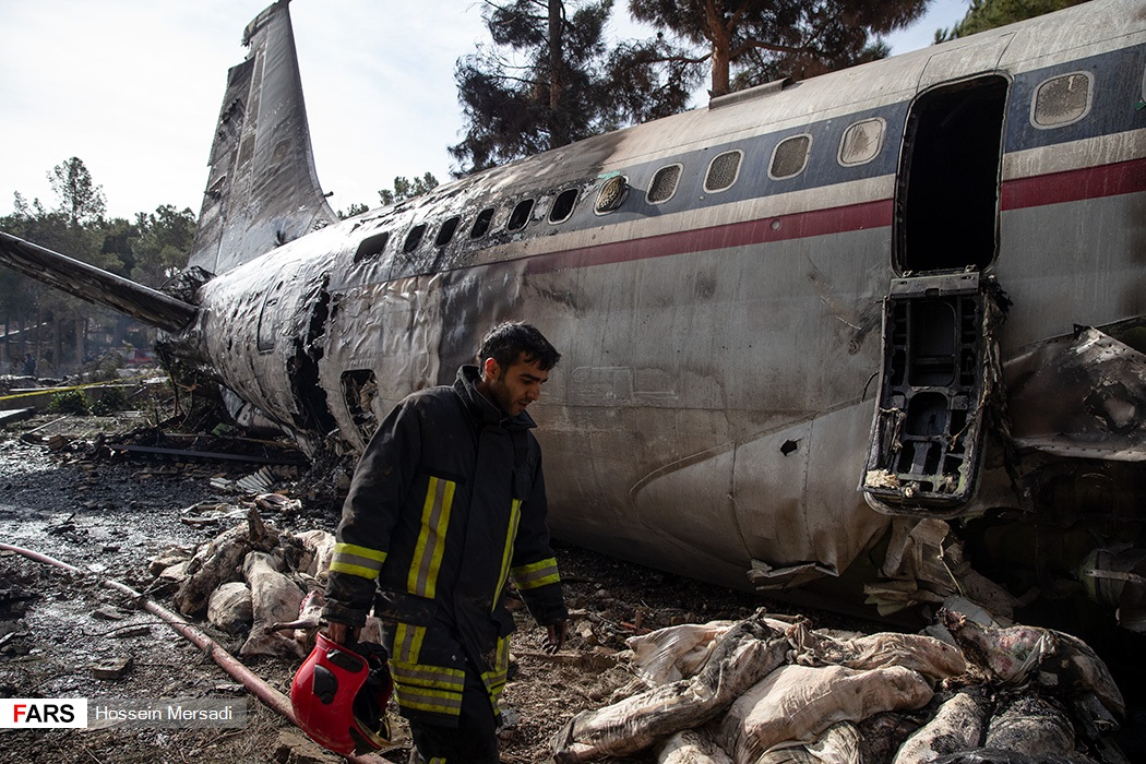 یک فروند هواپیمای باربری ۷۰۷ حامل گوشت از مبدا بیشکک کشور قرقیزستان، اقدام به فرود اضطراری در فرودگاه فتح البرز کرده که در هنگام فرود از باند خارج و پس از برخورد با دیوار انتهایی باند دچار آتش سوزی شد.